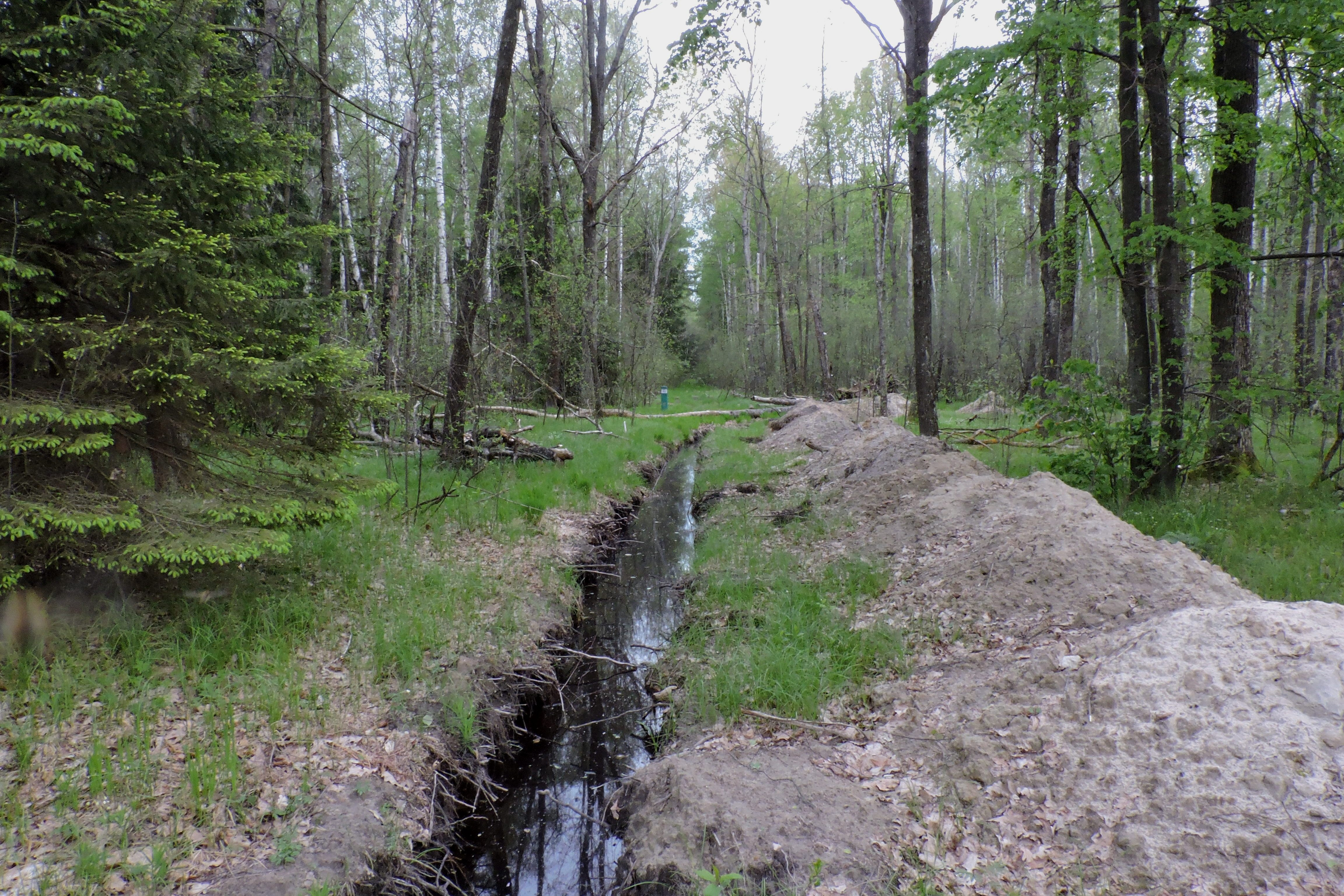 Довгий Брід, Романівський р-н, ДП «Бердичівське ЛГ», Дзержинське лісництво, кв. 17, 18, 19, 20, 21, 22, 23, 24, 39, 40, 41, 42, 43